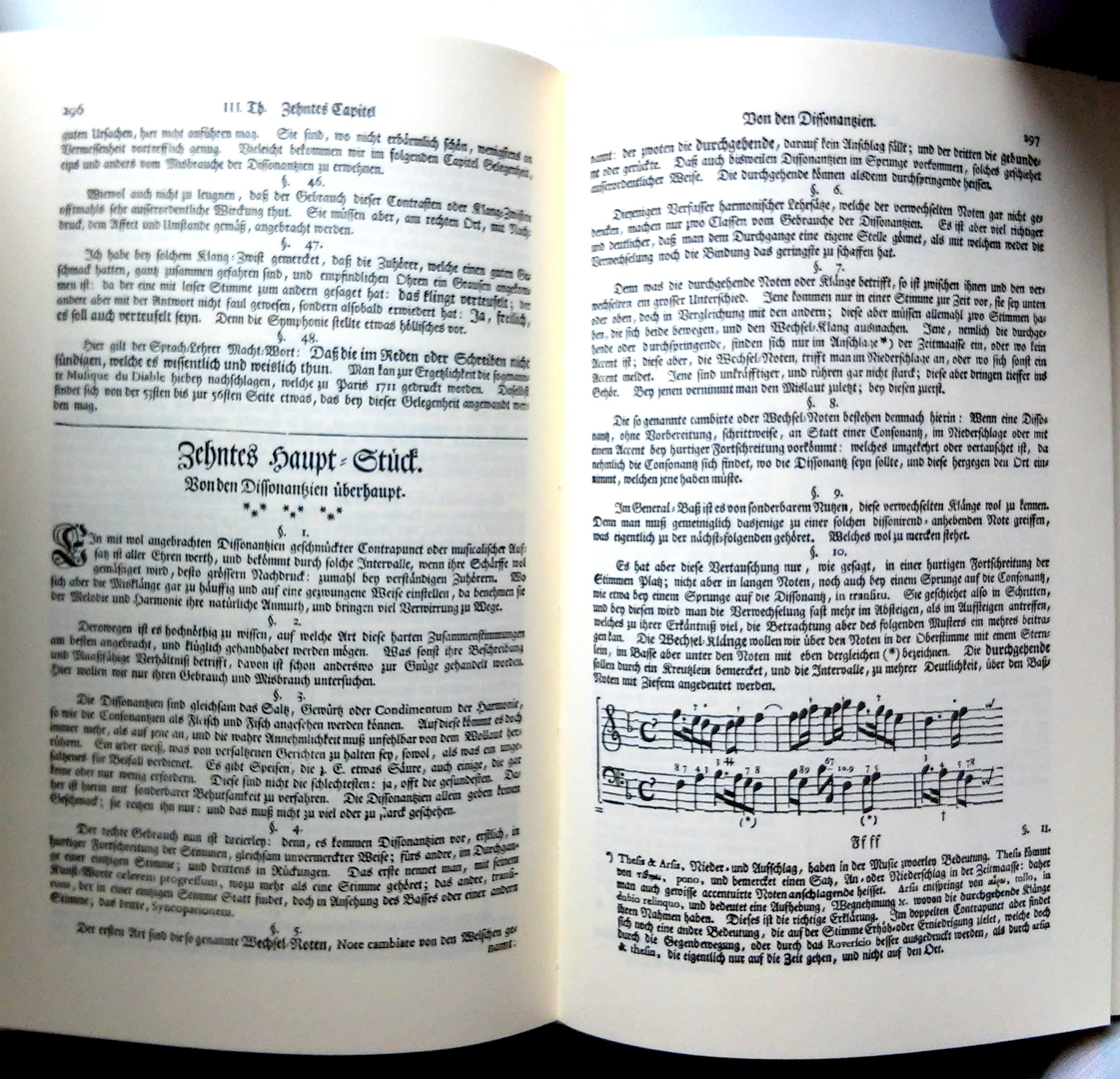 Johann Mattheson, Der vollkommene Capellmeister